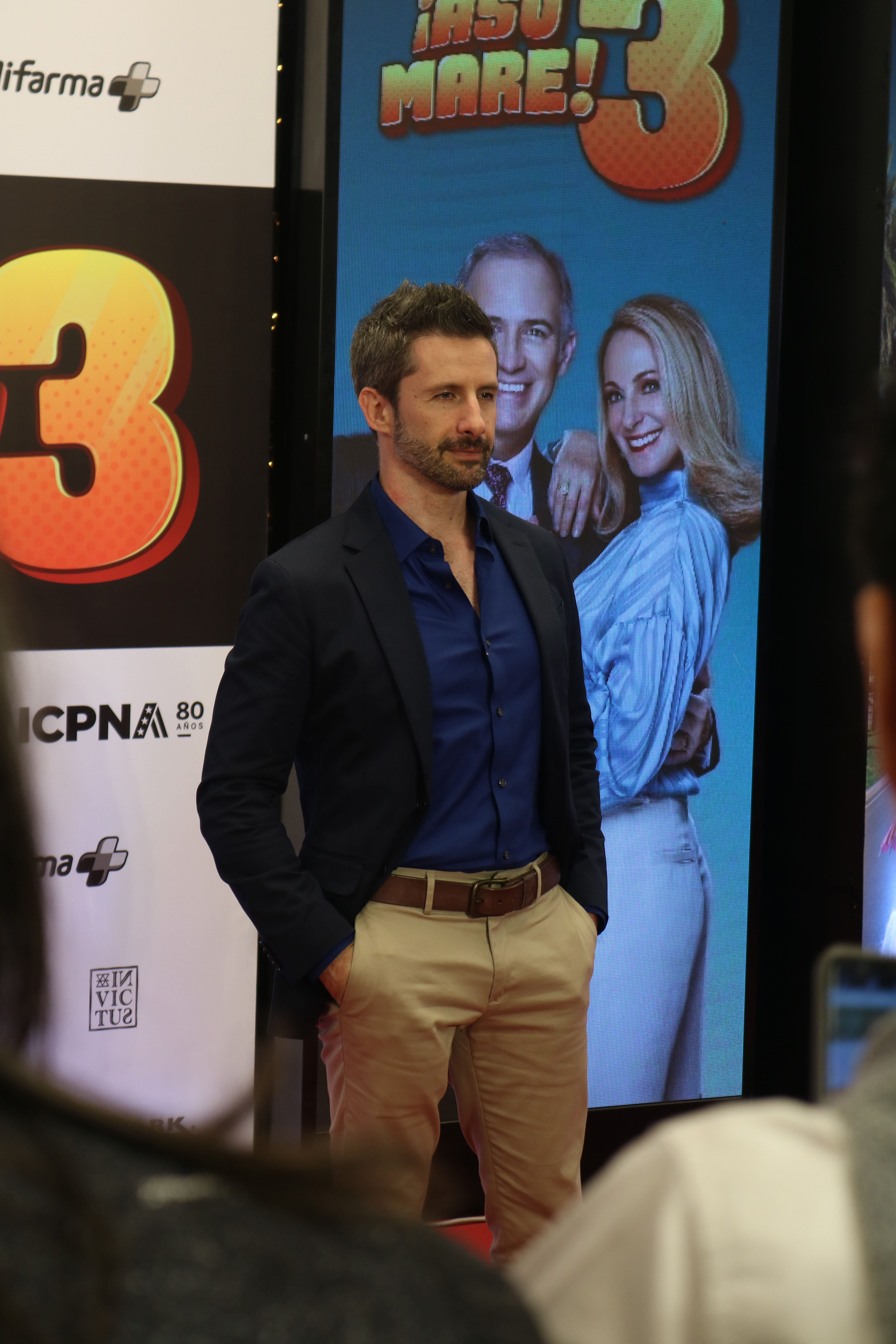 Marco Zunino durante la alfombra roja de Asu Mare 3.